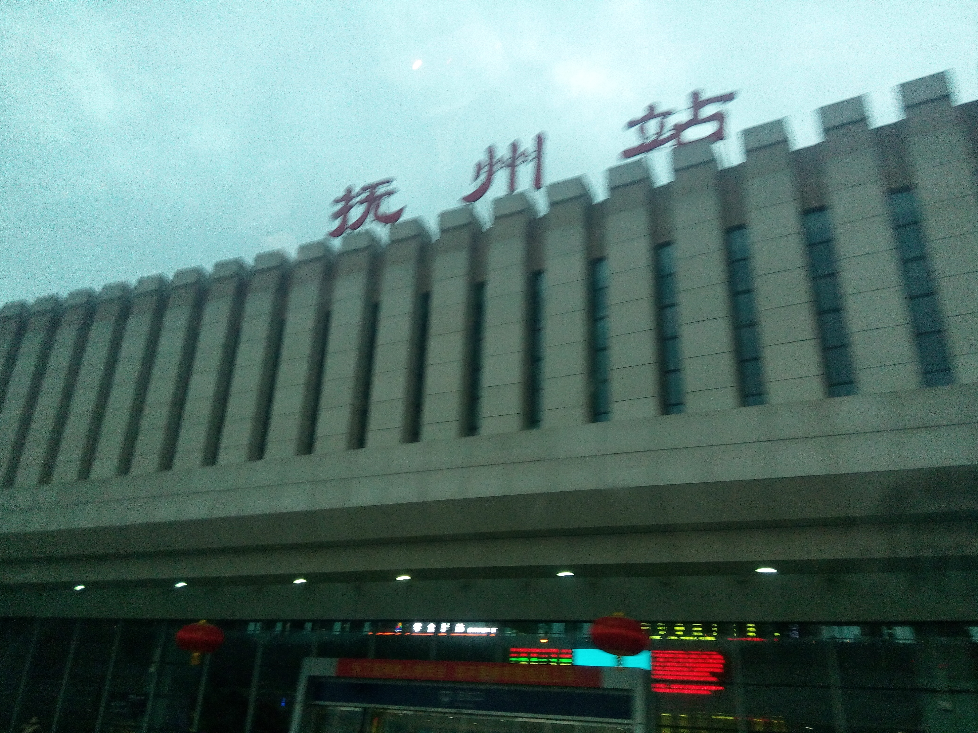 抚州站。。